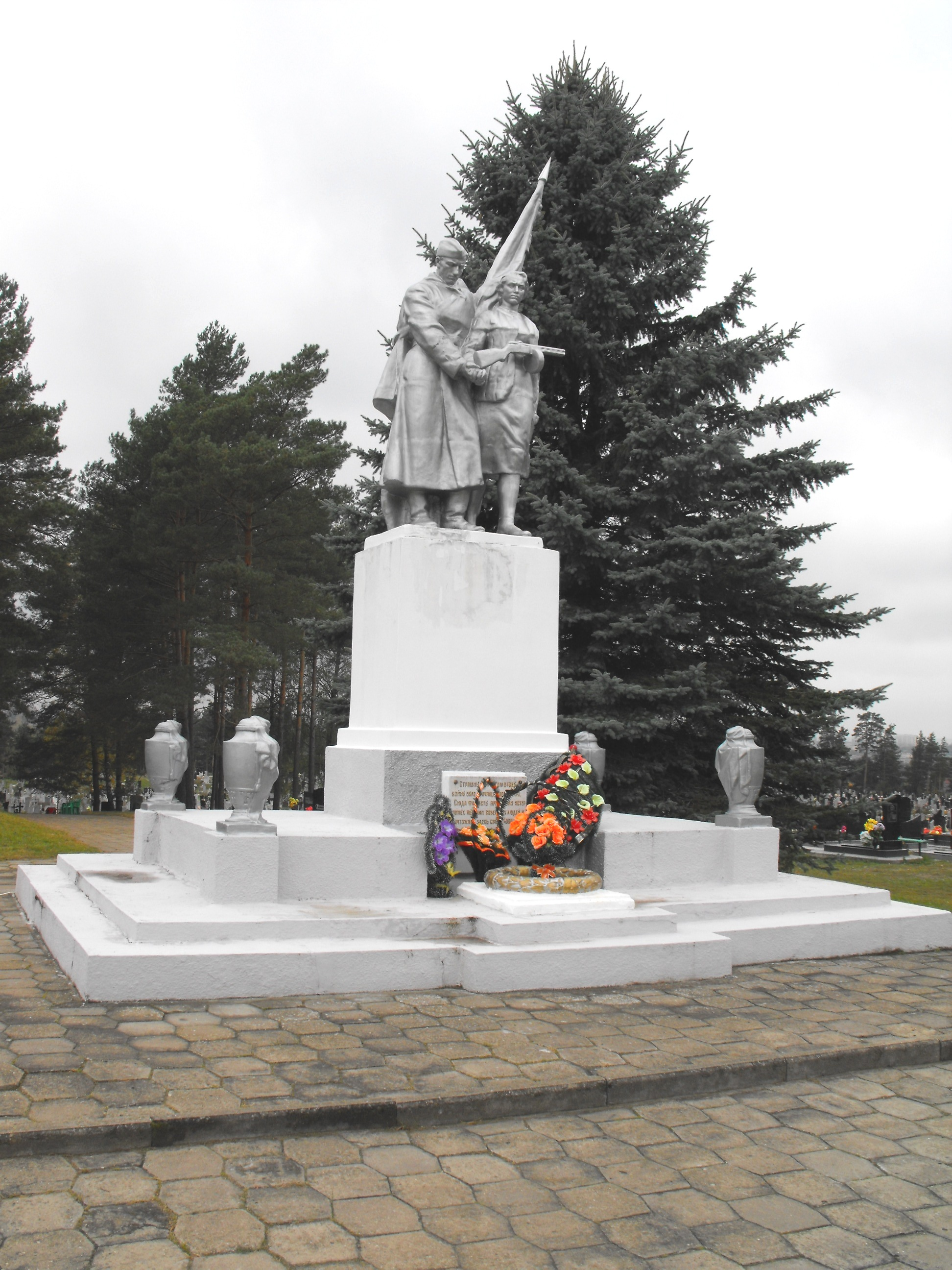 Волковыск, урочище Пороховня. Памятник мирным жителям - жертвам нацистов.